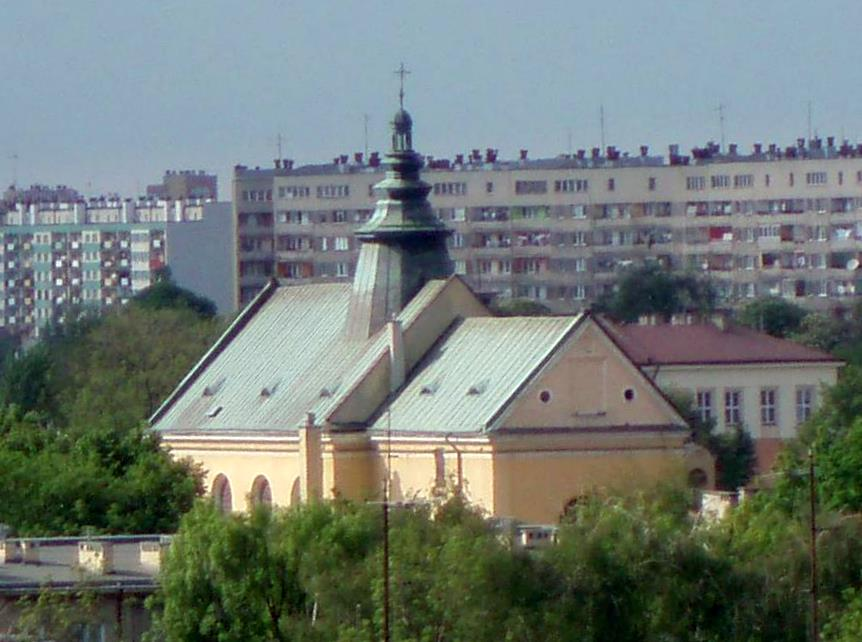 Rzeszów